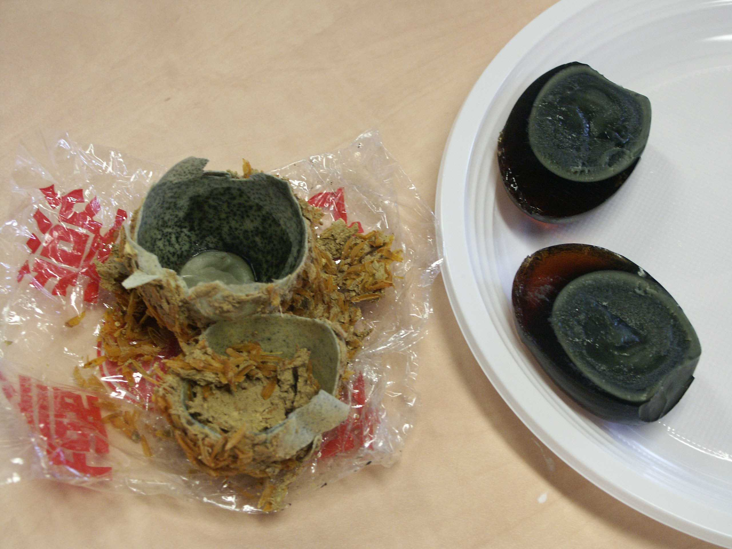 zelf gemaakt